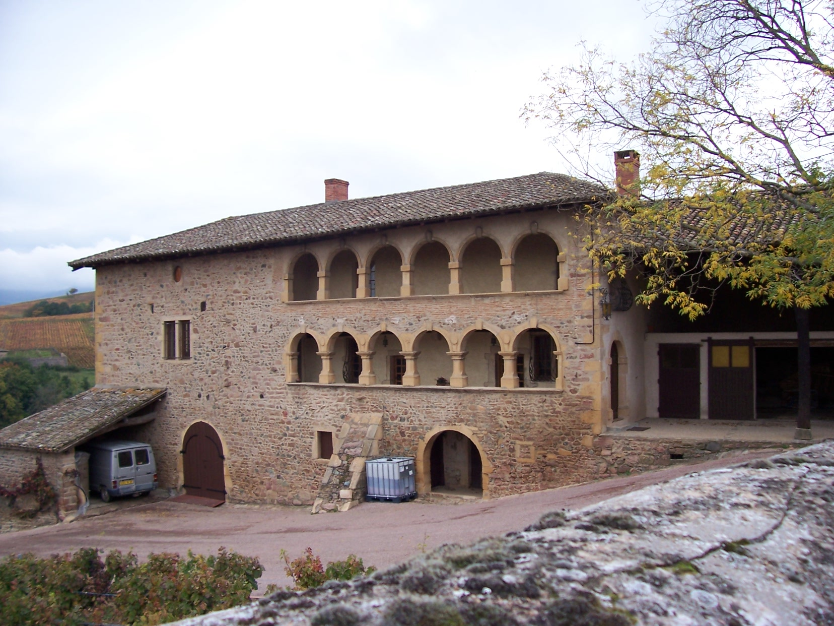 Juliénas dans le département français du Rhône : Maison romane dite Maison de la Dîme.